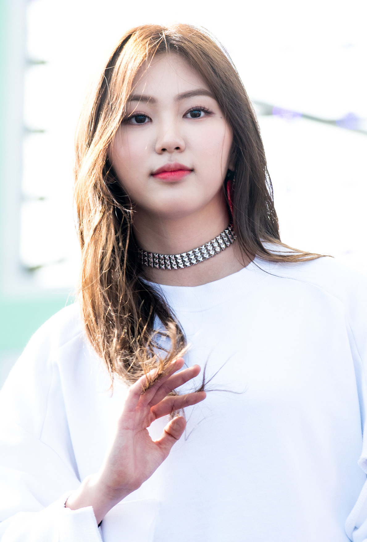 170408 논산딸기 축제 은빈